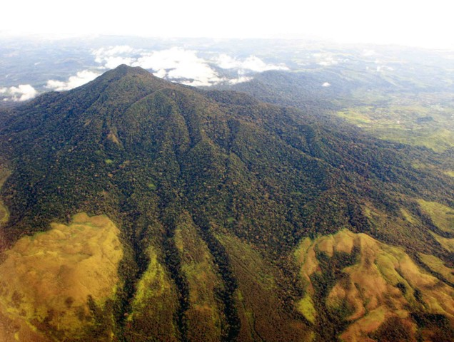 Mount Seulawaih Agam in Aceh, Indonesia